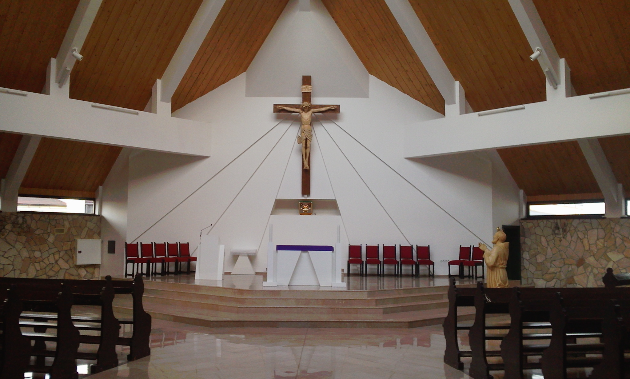 Zdjęcie wnętrza kościoła parafialnego pw. św. Ojca Pio w Zdzieszowicach